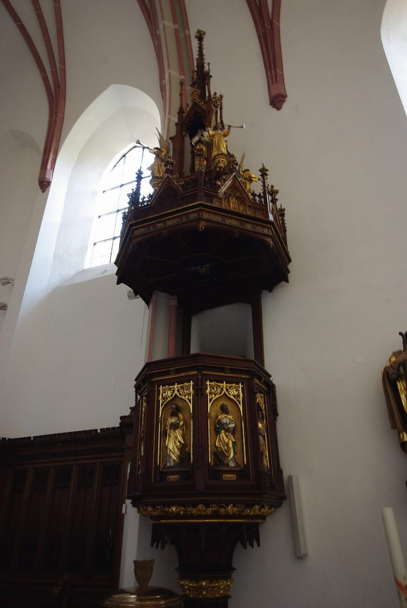 Kirche St. Ägidi, Bad ReichenhallThis is a photograph of an architectural monument.